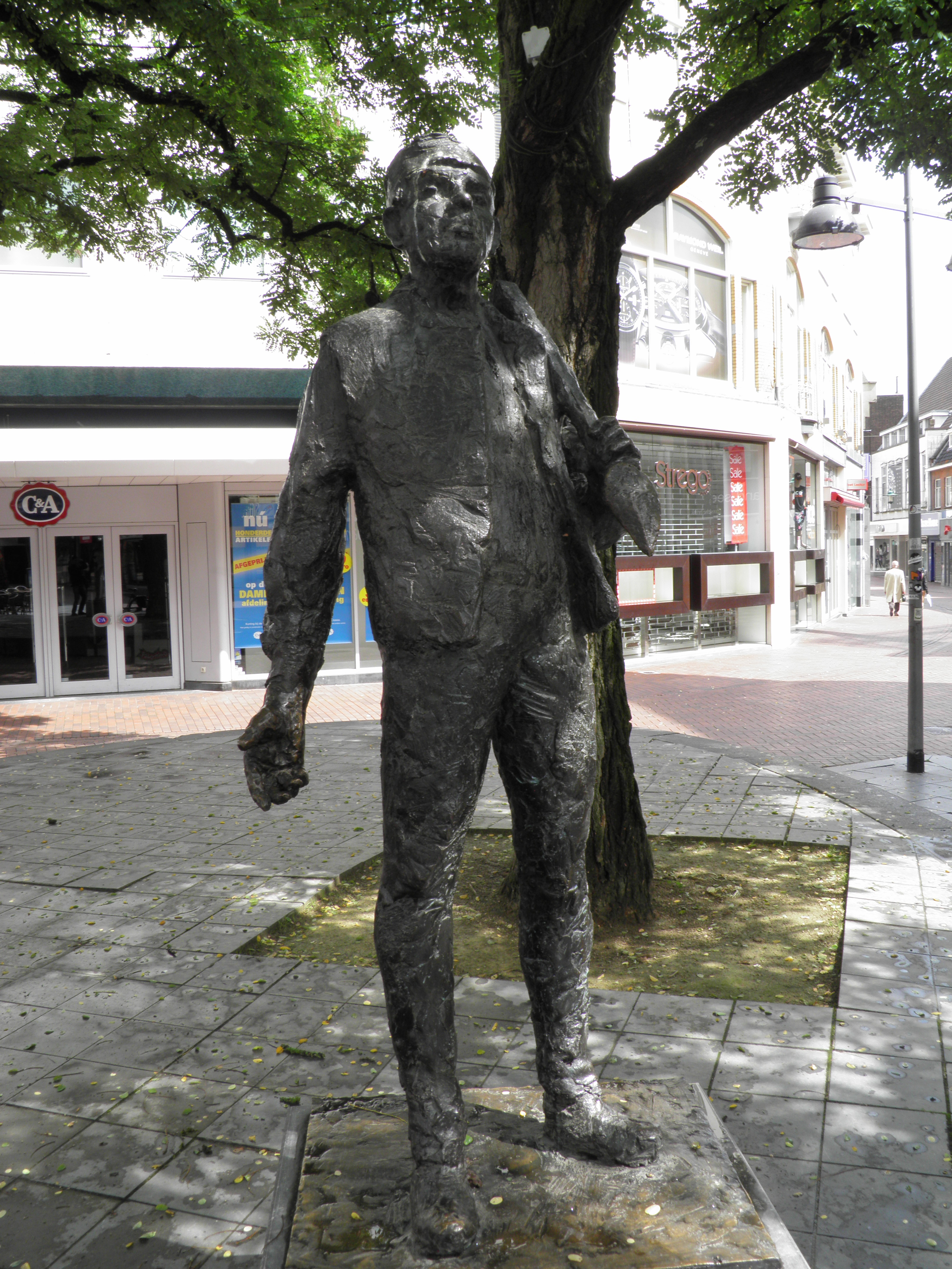 De Erfgooier, standbeeld aan de Kerkstraat, Hilversum. Gemaakt door Hans Bayens, 1977.